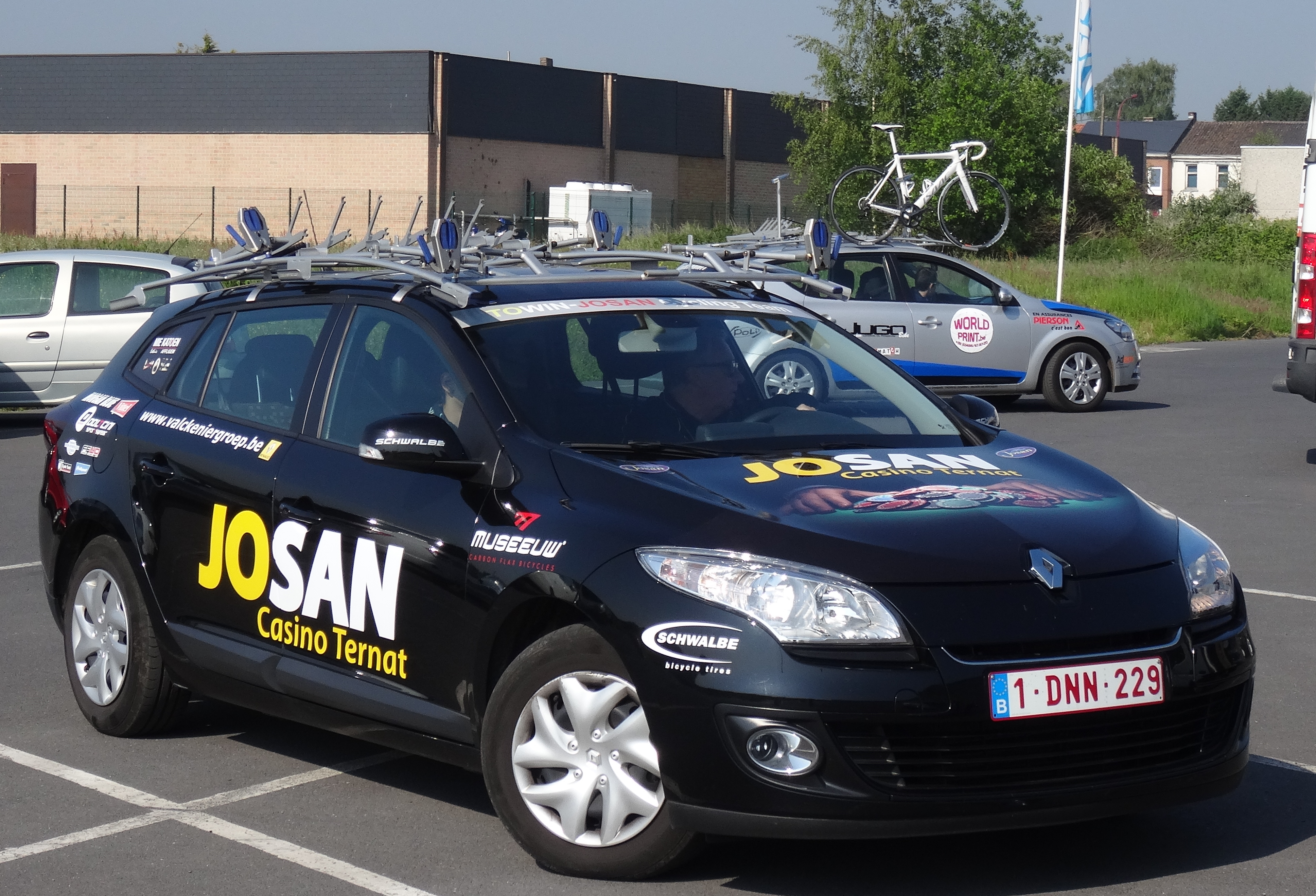 Reportage réalisé le samedi 17 mai à l'occasion du départ du Grand Prix Criquielion 2014 à Boussu, Belgique.